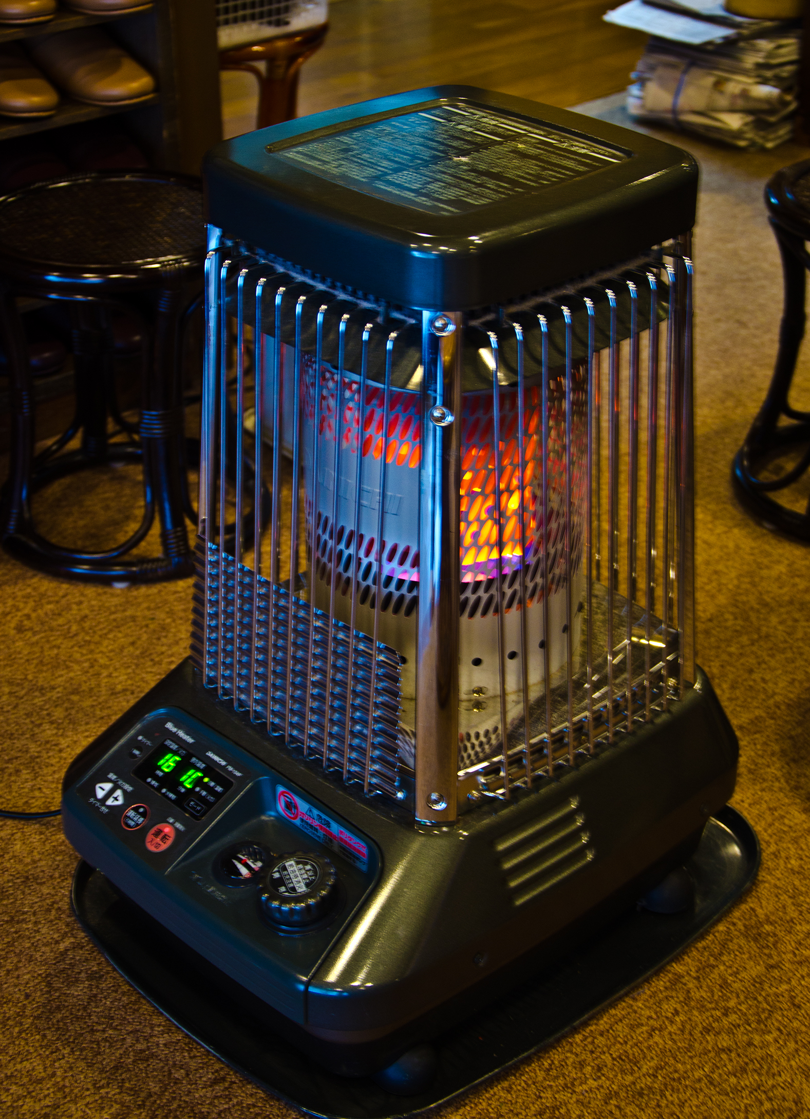 CWC_3793